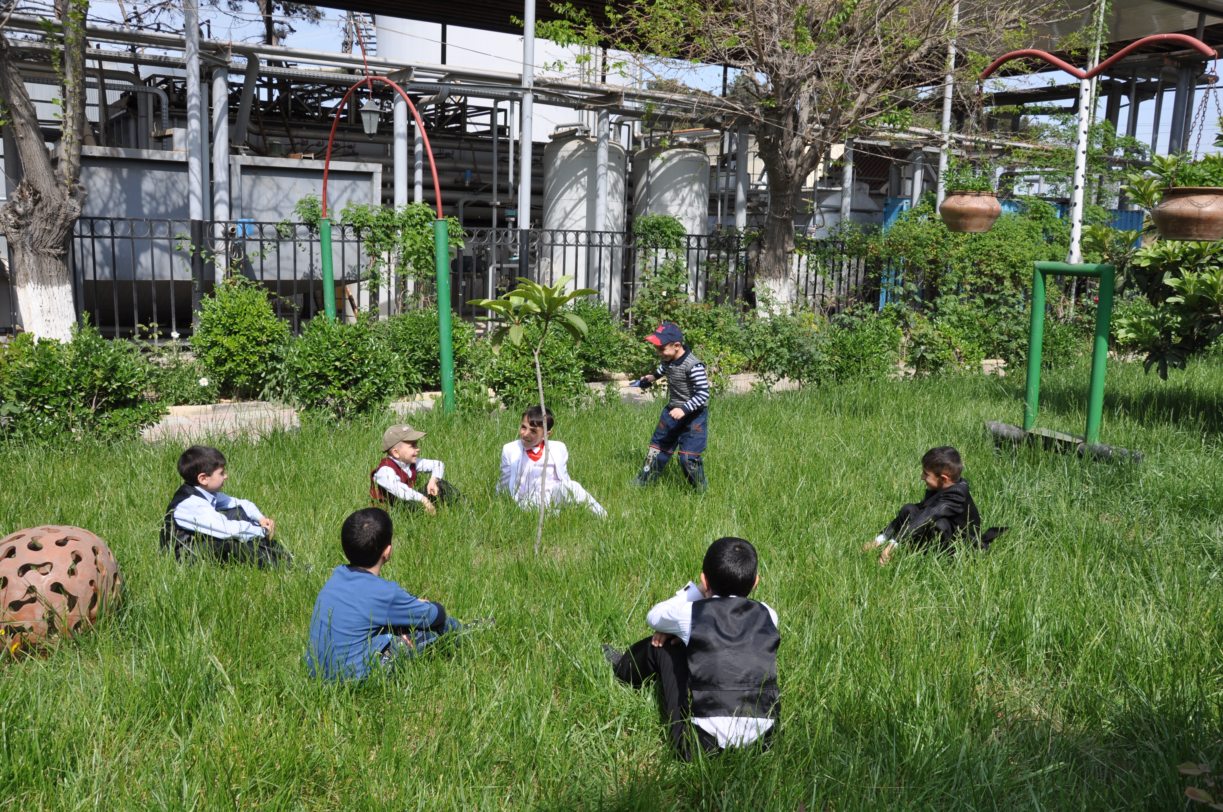 Dəsmal aldı, qaç - Azərbaycanda ən çox yazqabağı (bayramqabağı) günlərdə, eləcə də digər mövsümlərdə əsasən uşaq və gənclər arasında, geniş şəkildə oynanılan qədim oyunlarından biridir.